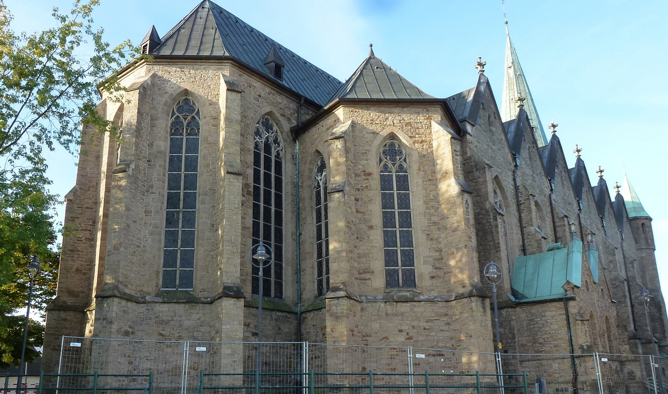 Mauritiusdom, Westansicht Chor mit Langhaus neugotisch